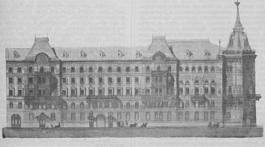 Здание собрания офицеров Гвардейского корпуса, вид с Кирочной улицы.